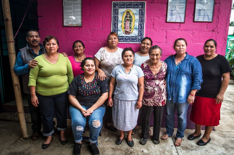 Atras: Pepe, Lupe, Rosa, Bernarda Enfrente: Toña, Karina, Julía, Doña Leo, Norma y María